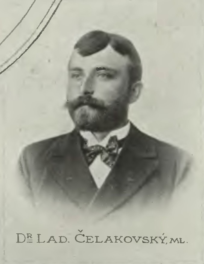 Portrét – Ladislav František Čelakovský ml. (1864-1916), Český mykolog a botanik.